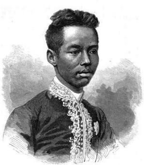 "Somdetch-Chufa-Chulalongkorn, nouveau roi de Siam et de Laos".